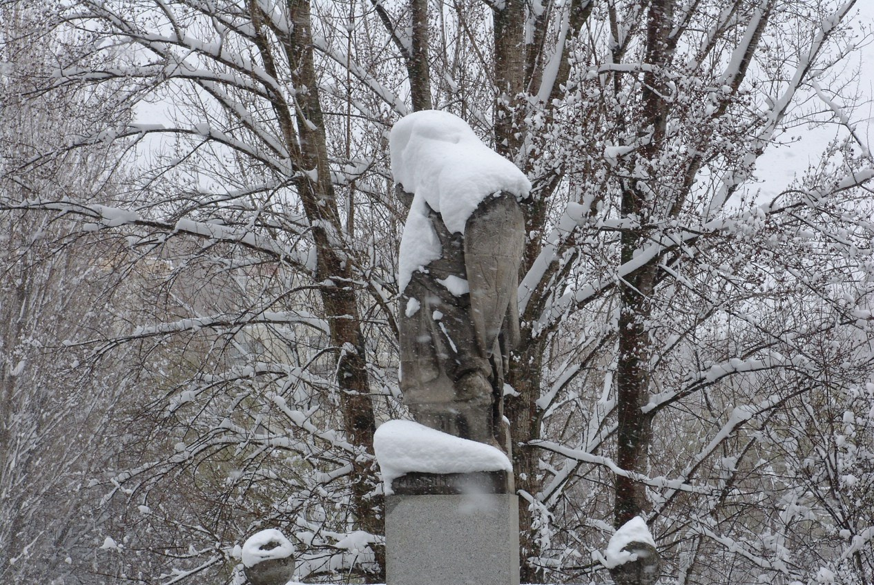 Burgos, Puente de San Pablo con nieve